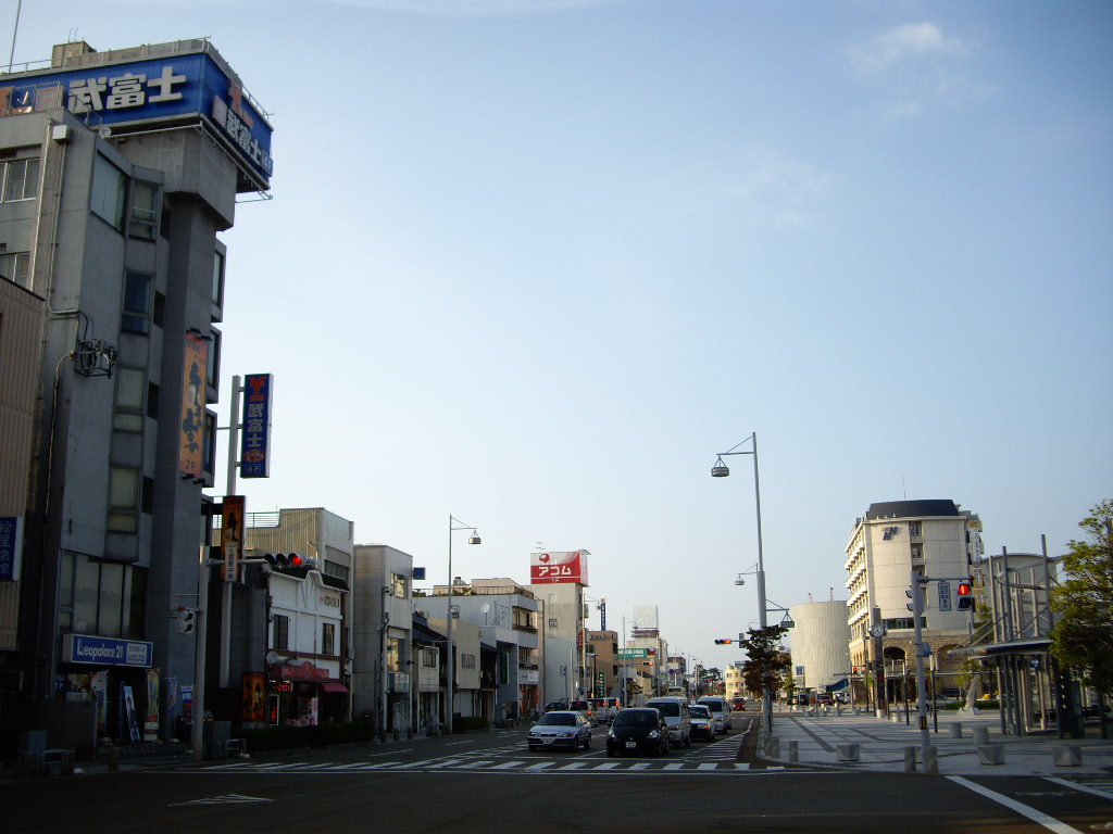 小松駅西口周辺